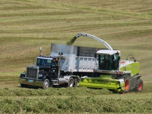 Claas-Feldhäcksler Jaguar 890 bei der Grasernte